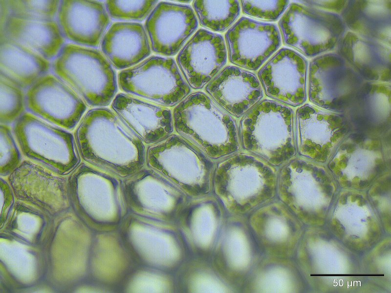 Müllers Bartkelchmoos (Calypogeia muelleriana), Zellen der Flankenblätter, Vergrößerung: 400x